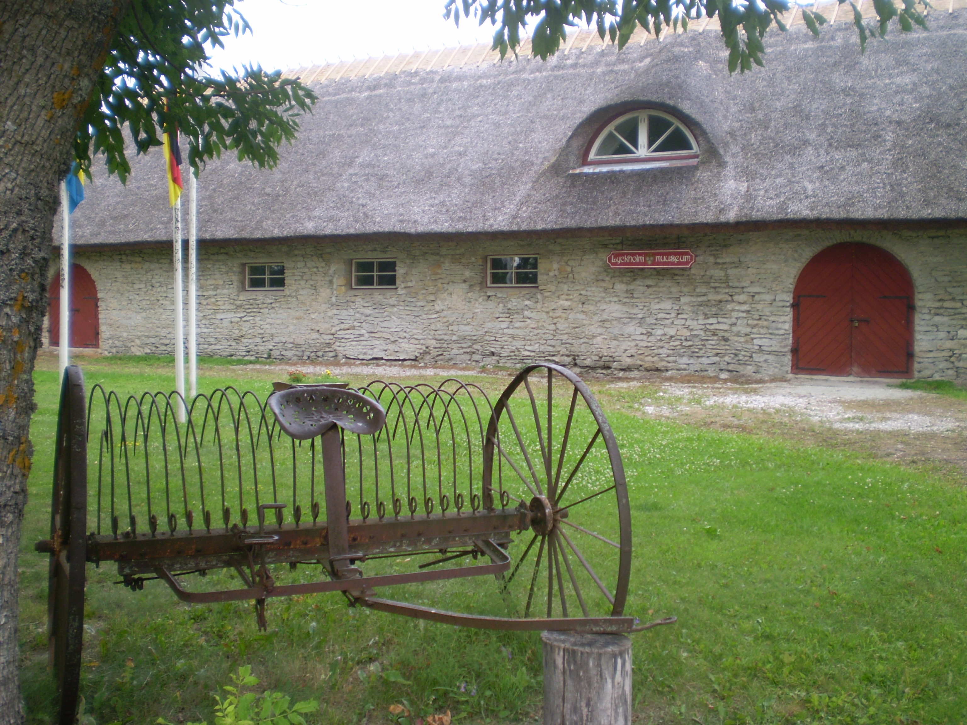 Saare mõisa tall